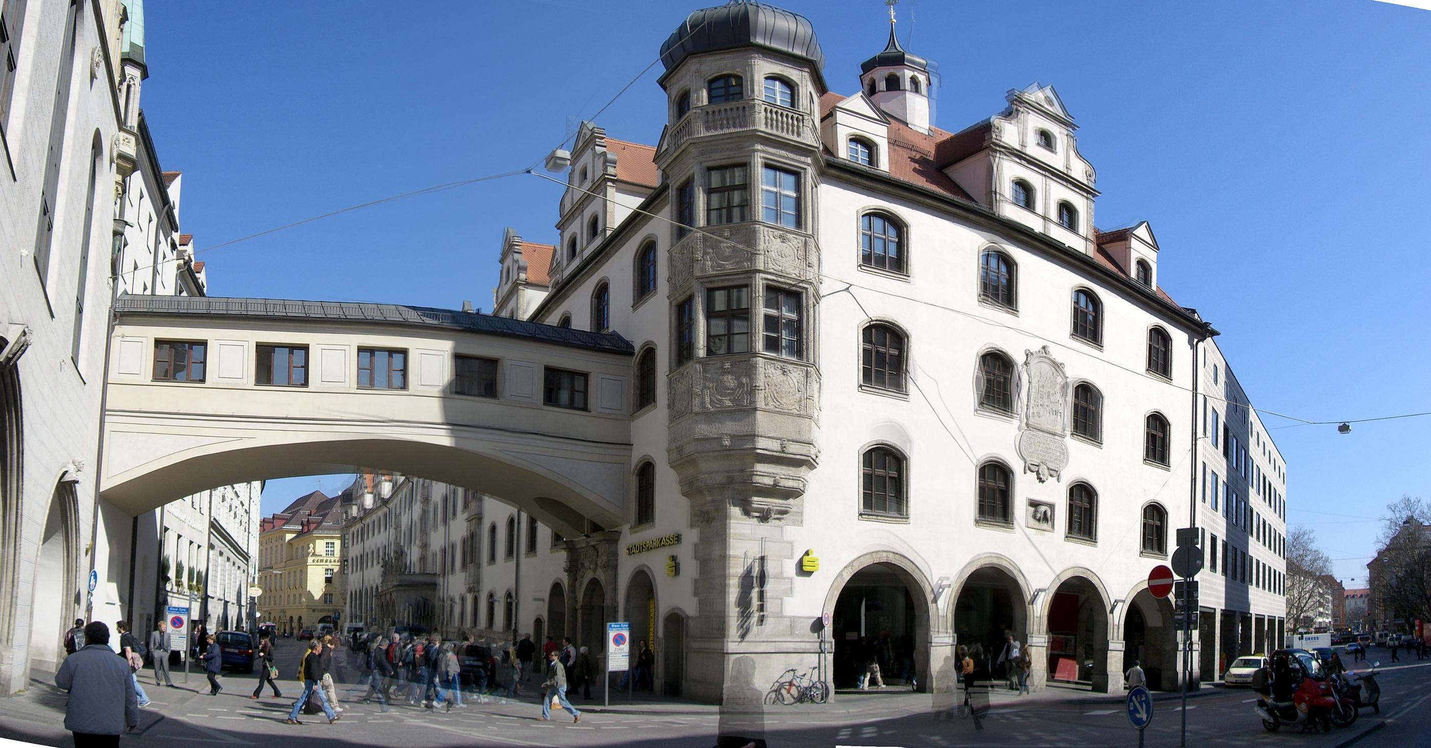 Stadtsparkasse München (Hauptsitz)